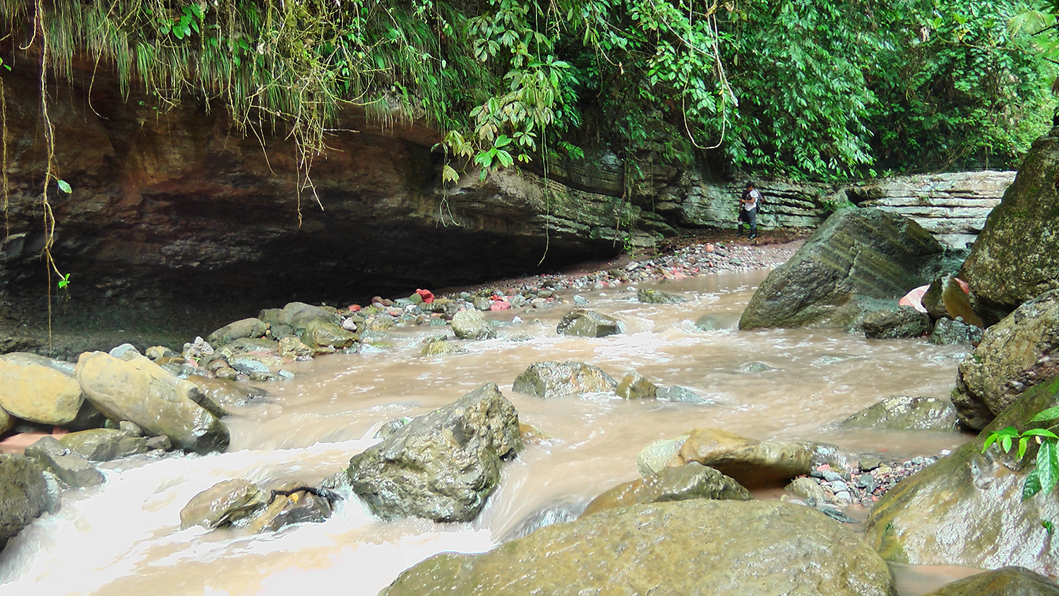 Río Cachiyacu de Santa Ana - Shapaja - Uchiza